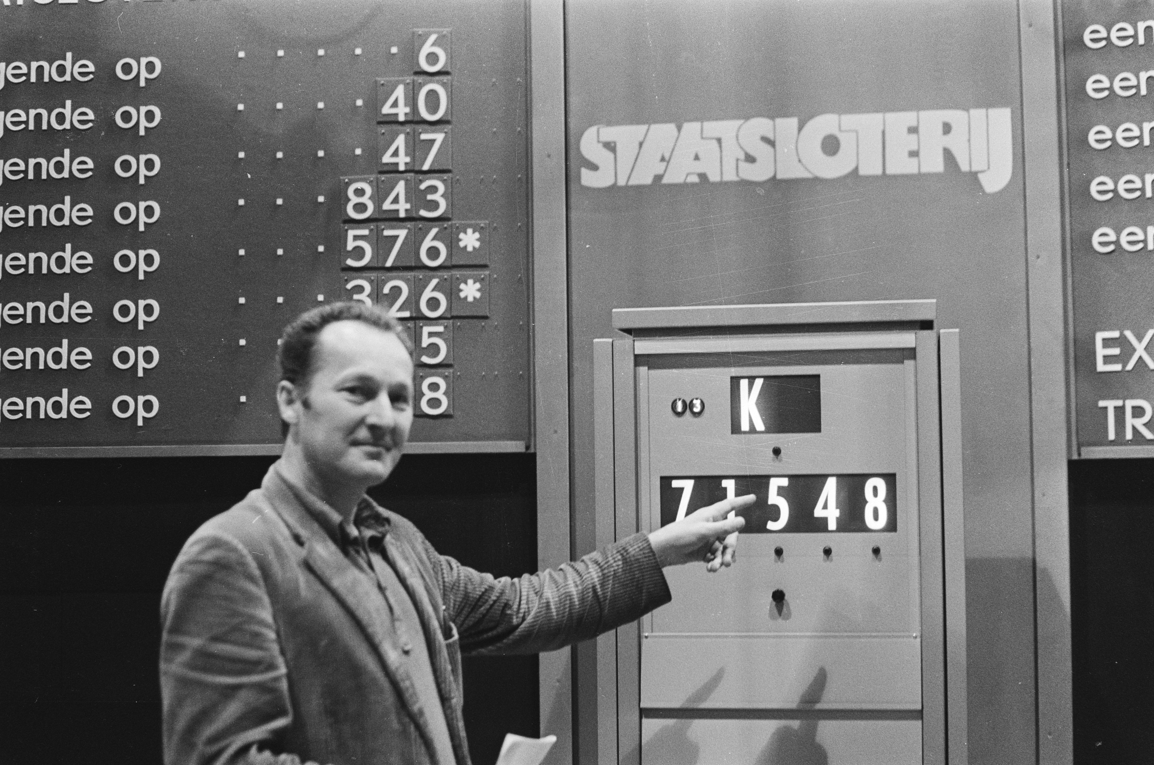 Collectie / Archief : Fotocollectie Anefo Reportage / Serie : [ onbekend ] Beschrijving : TV-uitzending; Trekking Staatsloterij , Amsterdam; man uit publiek kiest nummer Annotatie : De man uit het publiek lijkt op Ad 's-Gravesande van de VPRO Datum : 20 januari 1971 Locatie : Amsterdam, Noord-Holland Trefwoorden : loterijen, televisie, televisieprogramma's Fotograaf : Mieremet, Rob / Anefo Auteursrechthebbende : Nationaal Archief Materiaalsoort : Negatief (zwart/wit) Nummer archiefinventaris : bekijk toegang 2.24.01.05 Bestanddeelnummer : 924-1913